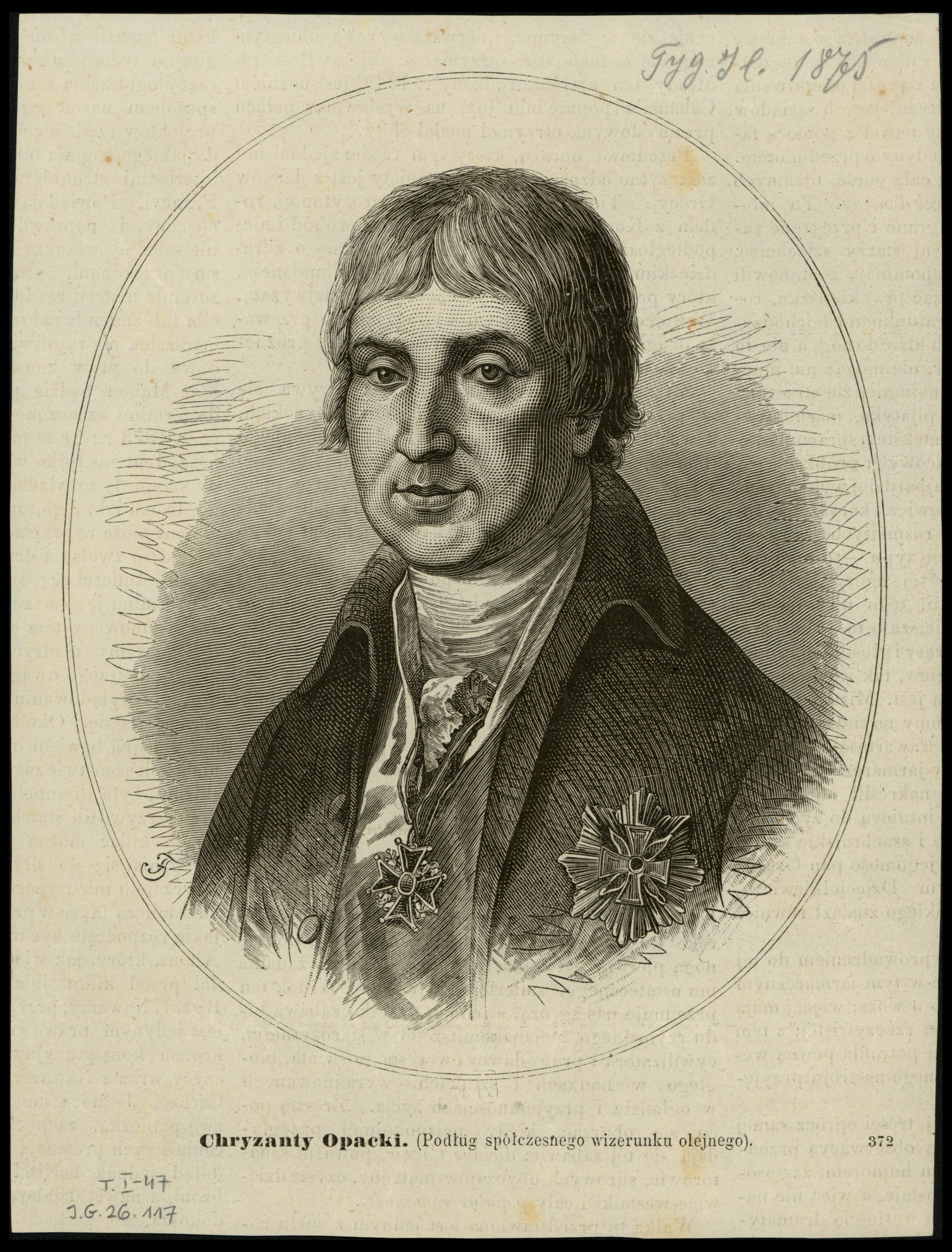 Chryzanty Opacki